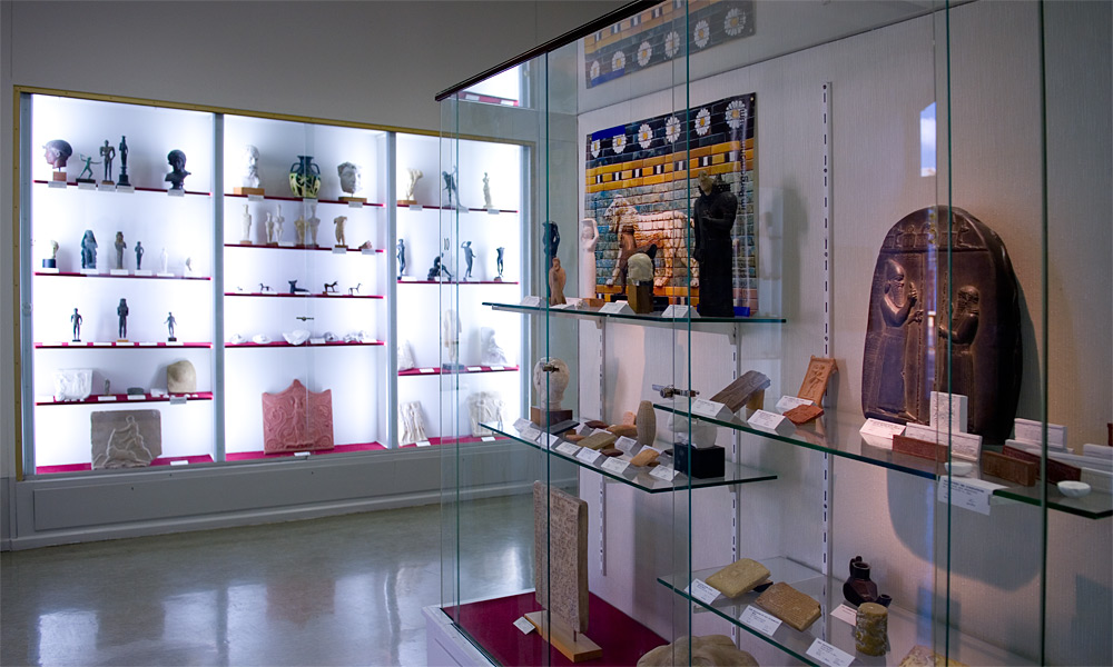 Gipsformerei Ausstellungsraum "Staatliche Museen zu Berlin" (Sophie-Charlotten-Straße 17/18, 14059 Berlin-Charlottenburg)